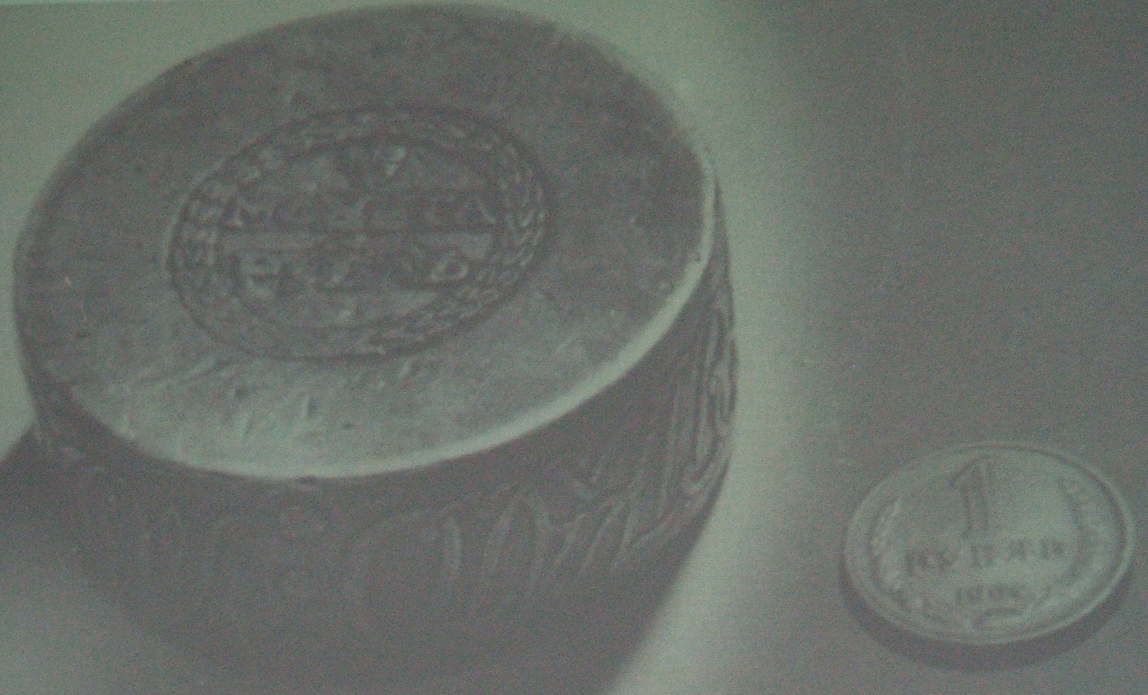 Сестрорецкий рубль на экспозиции музейного комплекса в Разливе